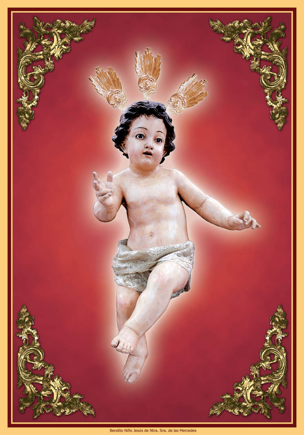 Imagen del Bendito Niño Jesús de Ntra. Sra. de las Mercedes. San Fernando (Cádiz) ESPAÑA